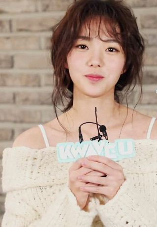 actriz Chae Soo Bin para KWAVE U Fan Wish en mayo de 2017